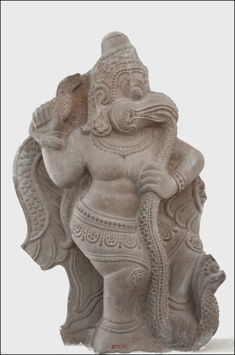 L'oiseau sacré Garuda Style de Thap Mam Grès Construit par l’École Française d’Extrême-Orient en 1915, le musée fut initialement baptisé Musée Henri Parmentier (nom de l’un des premiers explorateurs des sites du Royaume du Champa). Les oeuvres sont classées par provenance et par période, ce qui permet de suivre, de salle en salle, l’évolution de l’art cham au niveau de la sculpture. La majorité des objets proviennent des sites de Tra Kieu (ancienne capitale administrative du Royaume du Champa), de My Son, de Dong Duong (centre bouddhiste) et de Thap Man.